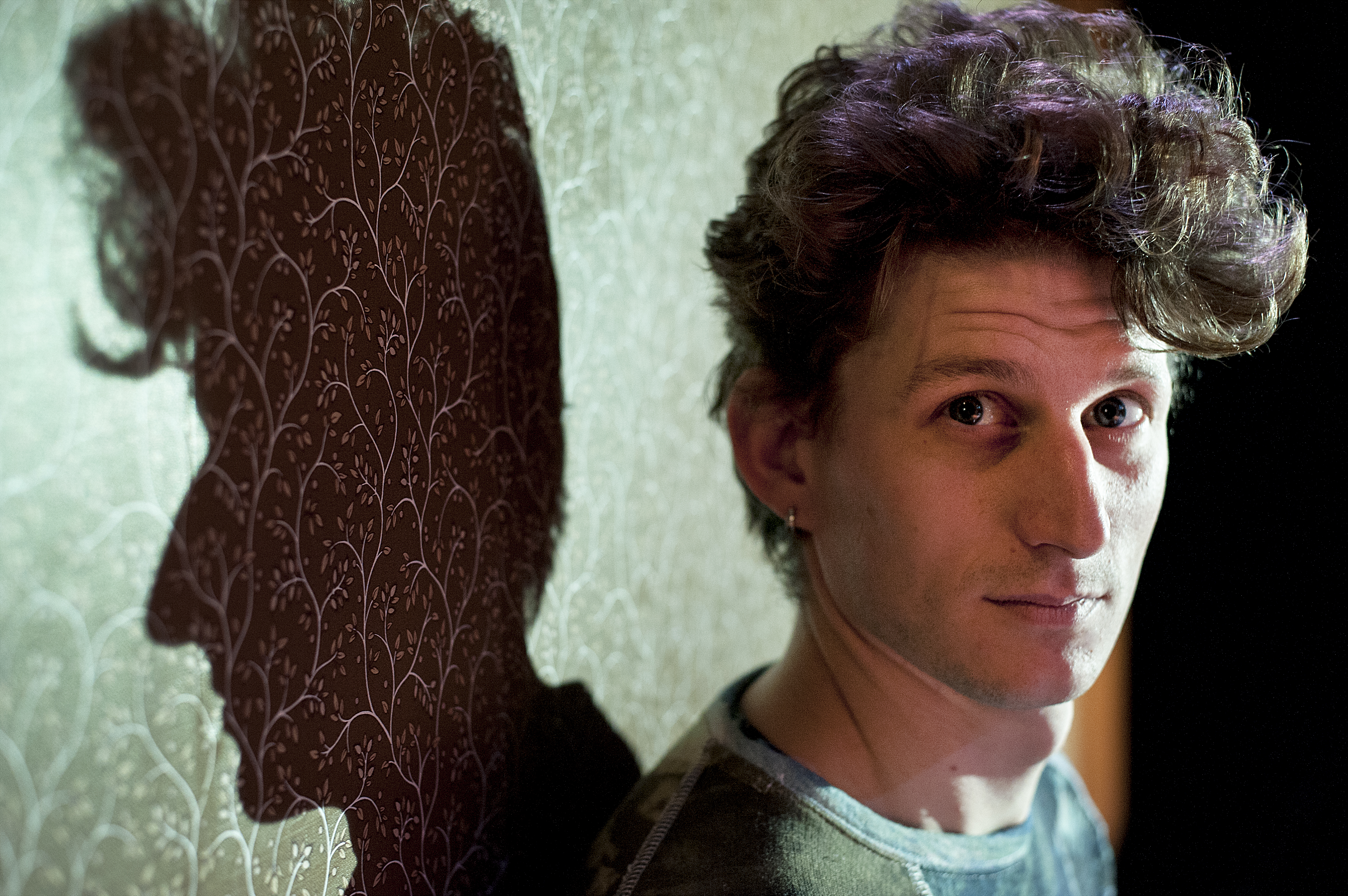 Titus Devoogdt, Gentse acteur. Naar aanleiding van de nieuwe theatervoorstelling (monoloog) 'De geschiedenis van de wereld (aan de hand van banaliteiten)', in regie van Johan De Smet voor de kopergietery.